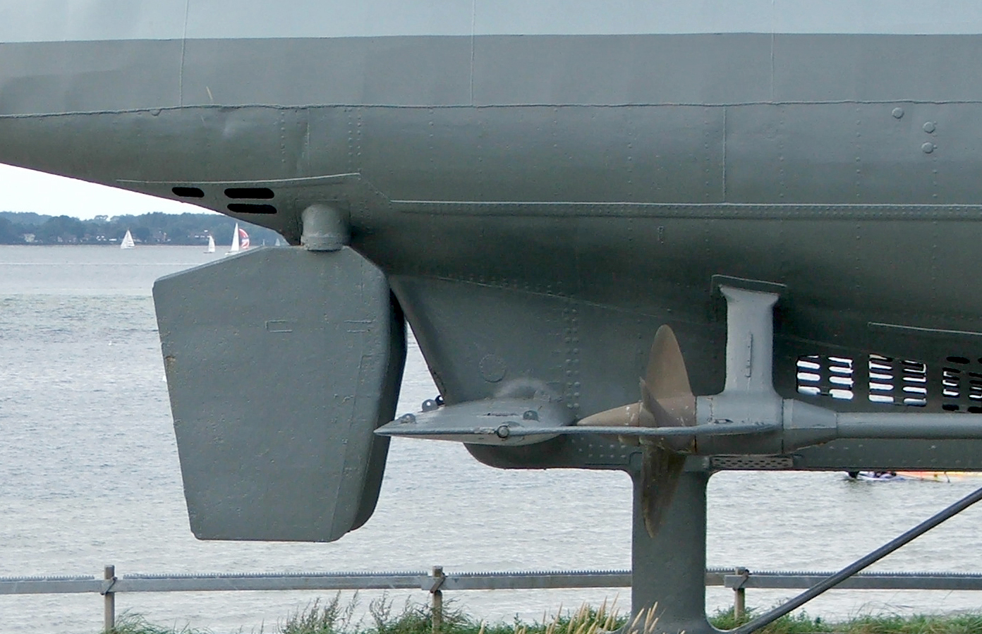 Ruder und achteres Tiefenruder von U-995